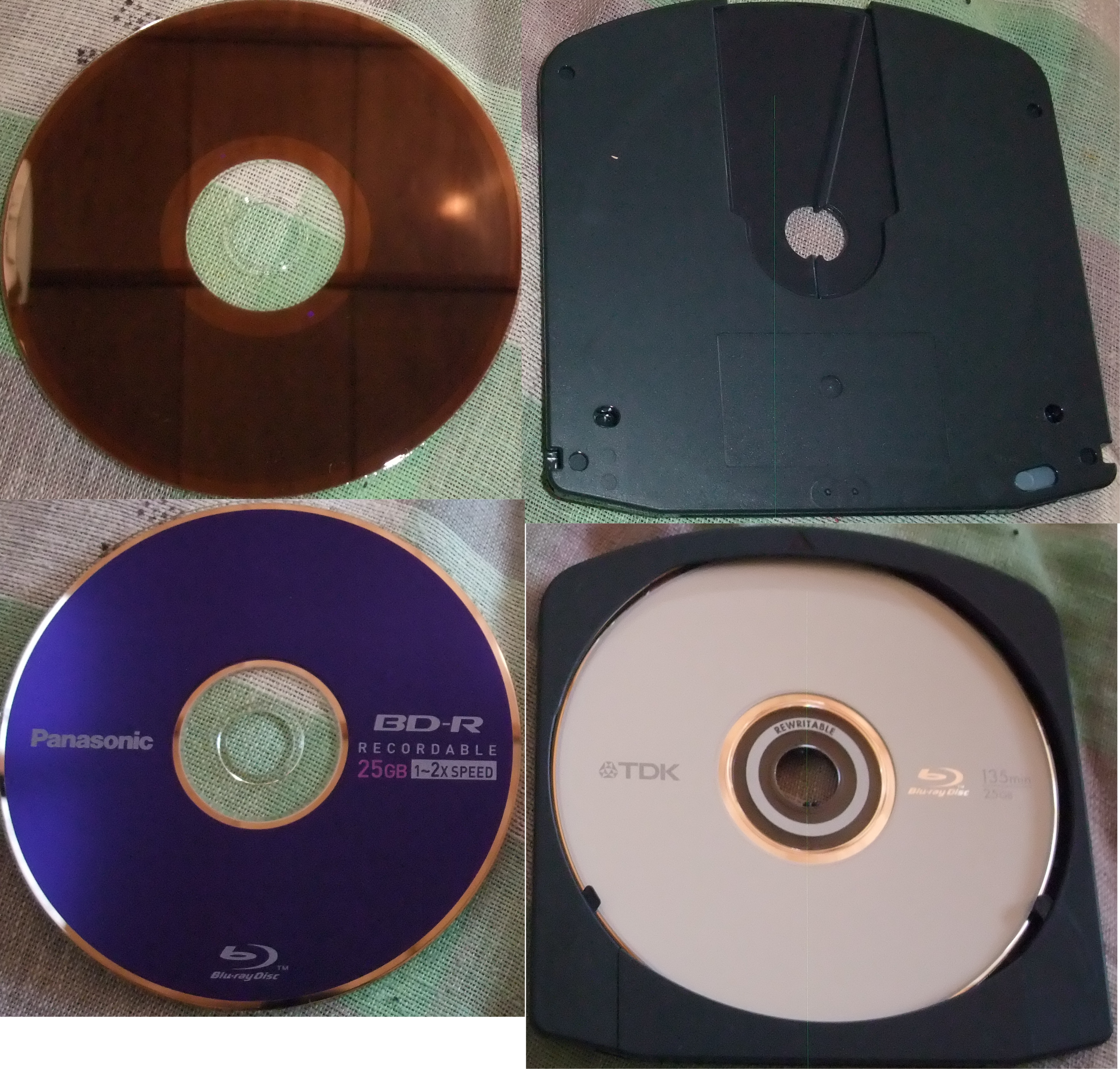 カートリッジ式ブルーレイとベアディスク型ブルーレイ